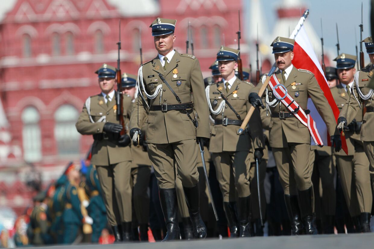 Военный парад, посвящённый 65-летию Победы в Великой Отечественной войне.